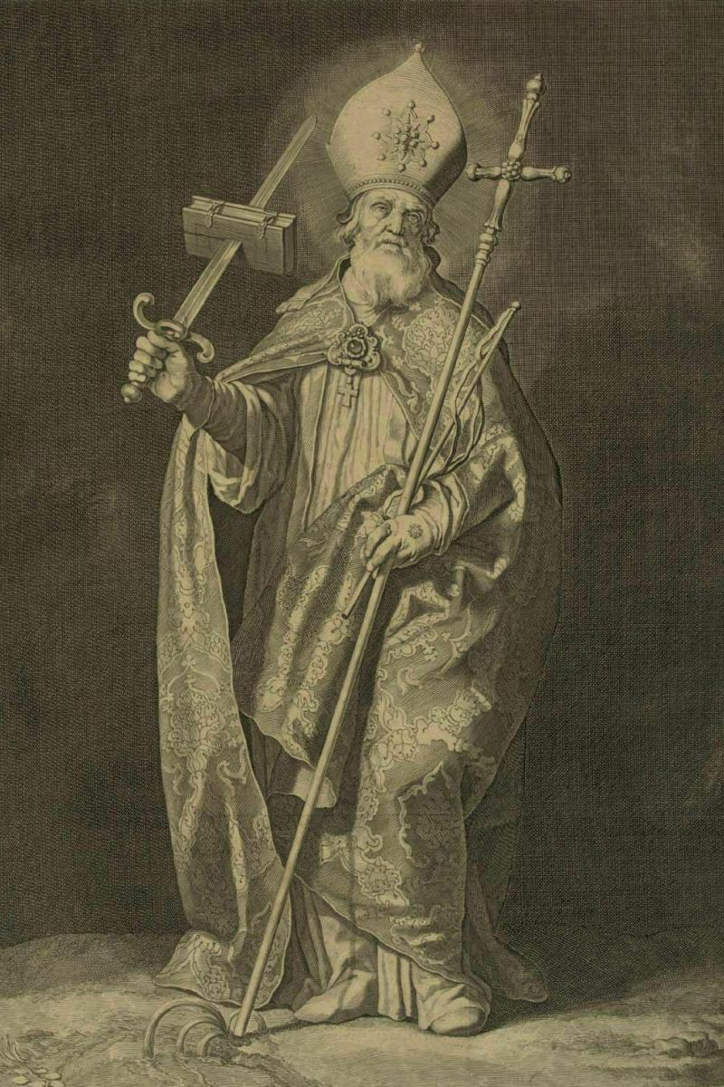 Der Heilige Bonifatius